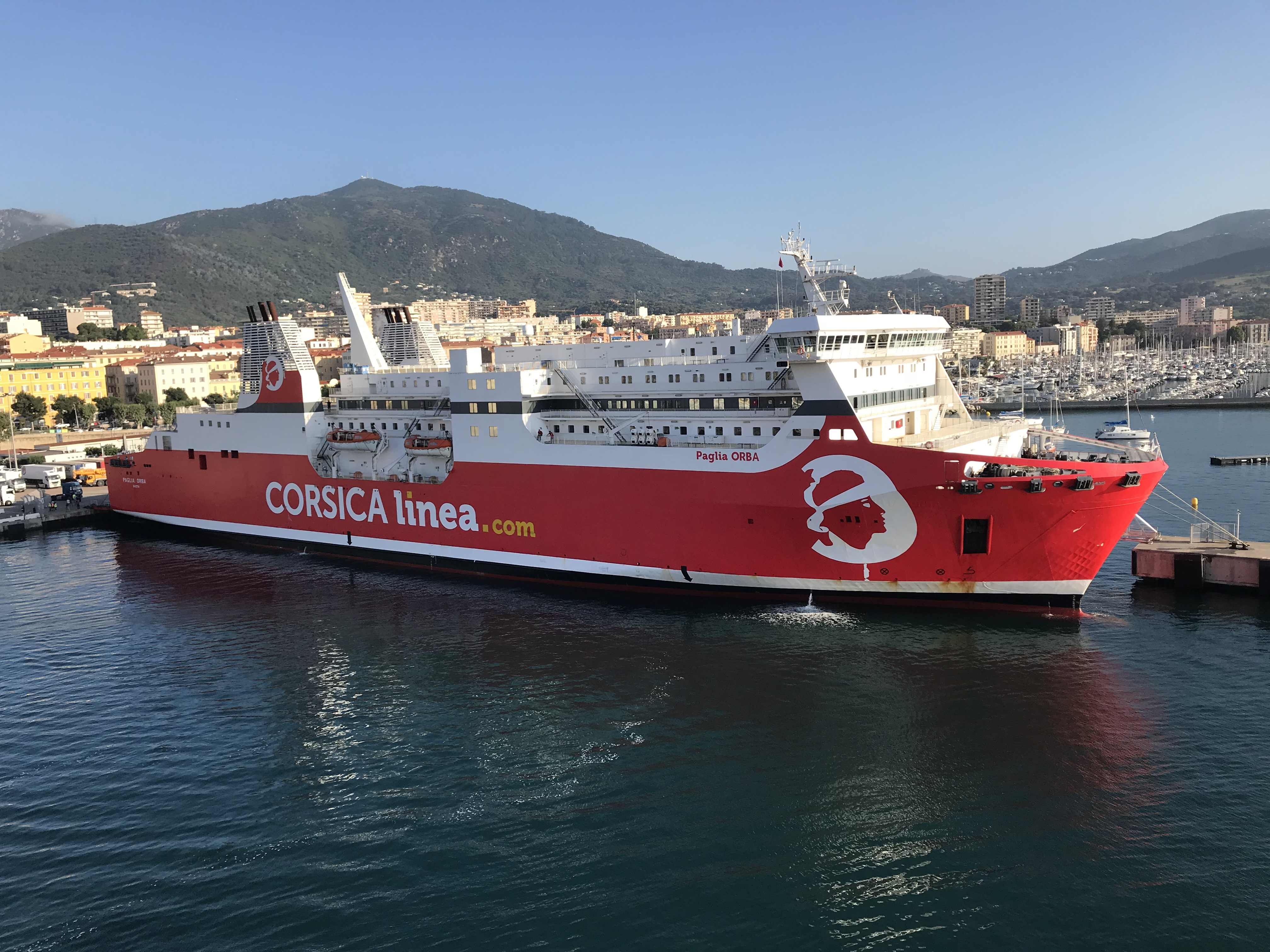 Le navire mixte Paglia Orba de la compagnie Corsica Linea à Ajaccio.